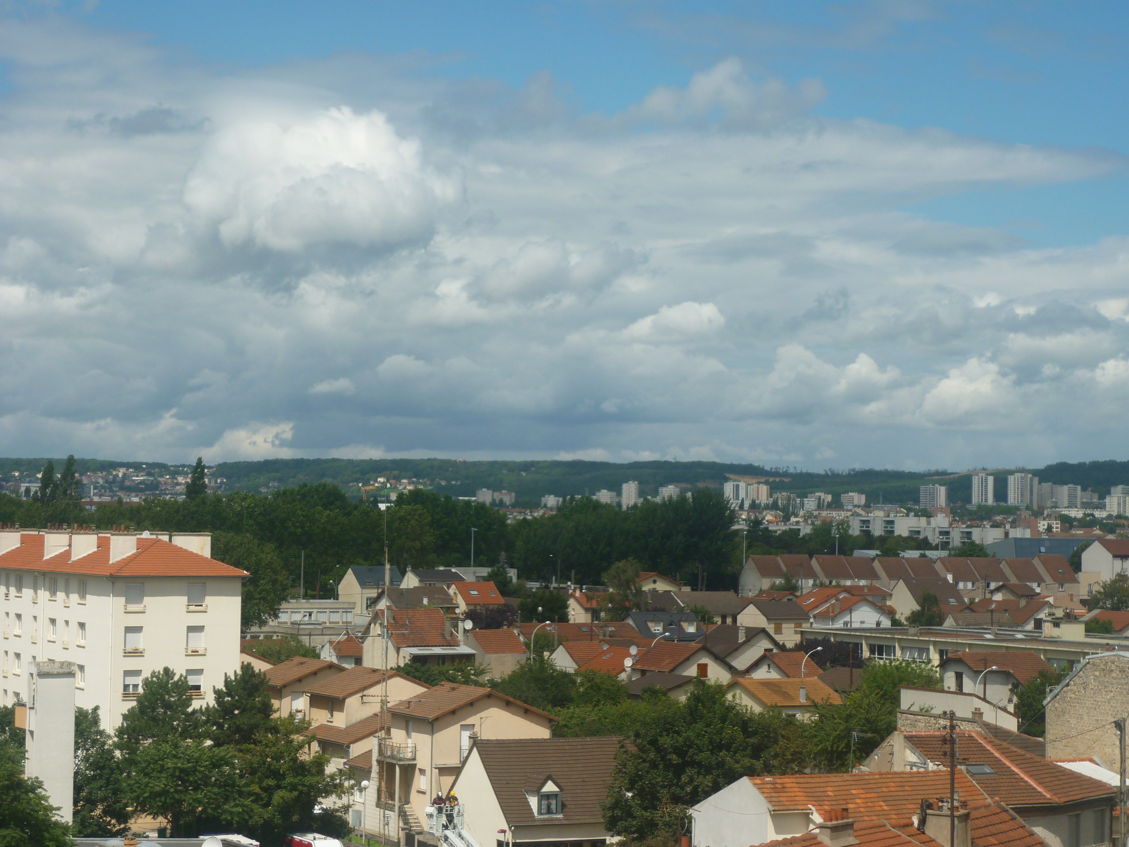 Panorama de Bezons côté maisons avec l'arrière-pays Bezonnais